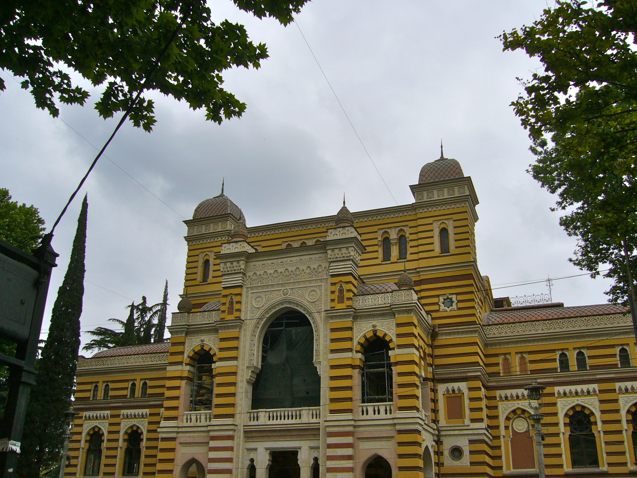 opera Georgia